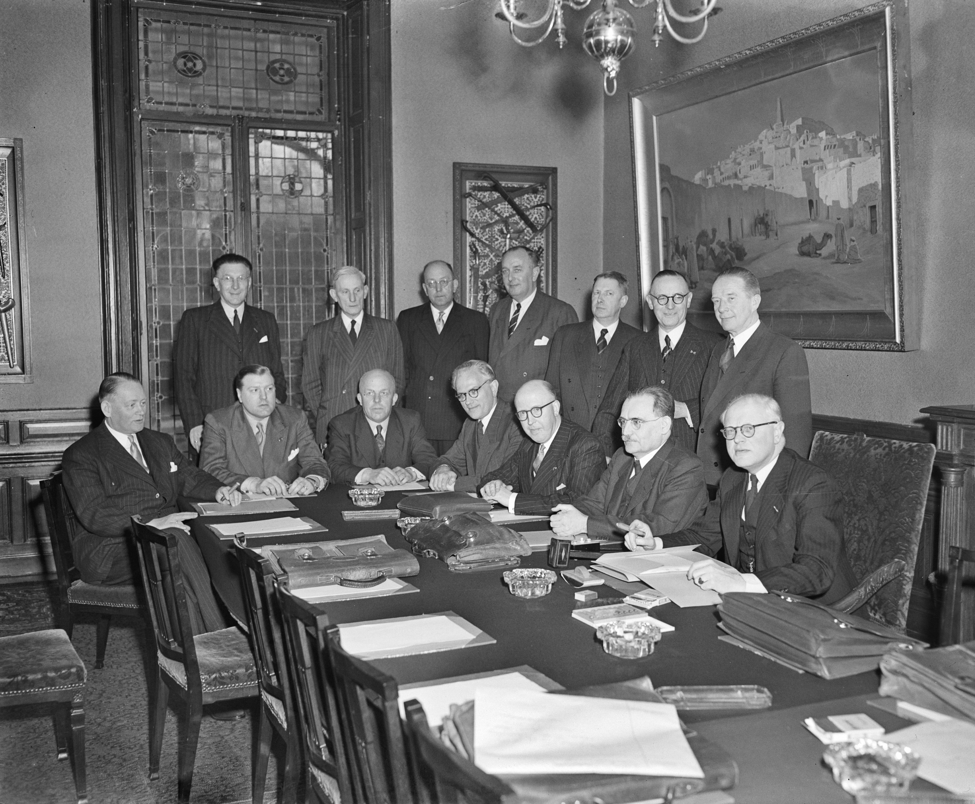 Collectie / Archief : Fotocollectie Anefo Reportage / Serie : [ onbekend ] Beschrijving: presentatie van kabinet-Drees II in Den Haag. Voorste rij v.l.n.r.: Stikker (Buitenlandse Zaken), Van den Brink (Economische Zaken), Staf (Marine), In 't Veld (Wederopbouw en Volkhuisvesting), Lieftinck (Financiën), Drees (premier en Algemene Zaken) en formateur Romme. Achterste rij v.l.n.r.; Wemmers (Verkeer en Waterstaat), Joekes (Sociale zaken en Volksgezondheid), Van Maarseveen (Binnenlandse zaken), Albregts (Economische zaken), Mulderije (Justitie), F.G.C.J.M. Teulings (Bescherming Bevolking en Burgerlijke Verdediging) en F.J.T. Rutten (Onderwijs, Kunsten en Wetenschappen). Volgens een andere gebruikelijke nummering was dit het kabinet-Drees II, maar deze nummering is niet gebruikt in de Wikipedia artikelen. Datum: 14 maart 1951 Locatie: Den Haag, Zuid-Holland Trefwoorden: ministers, ambtsaanvaardingen, regeringen Persoonsnaam: Albregts, A.H.M., Brink, Jan van den, Drees, Willem (sr.), Joekes, A.M., Lieftinck, Pieter, Maarseveen, J.H. van, Mulderije, H., Romme, C.P.M., Rutten, F.J.Th., Staf, C., Stikker, D.U., Teulings, Frans, Veld, J. in 't, Wemmers, Hendrik Hermanus Fotograaf: Meijer, […] / Anefo Auteursrechthebbende: Nationaal Archief Materiaalsoort: Negatief (zwart/wit) Nummer archiefinventaris: bekijk toegang 2.24.01.04 Bestanddeelnummer: 904-4729